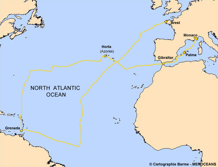 Campagne OceanoScientific 2013-14 - 10 000 milles nautiques (18 520 km)